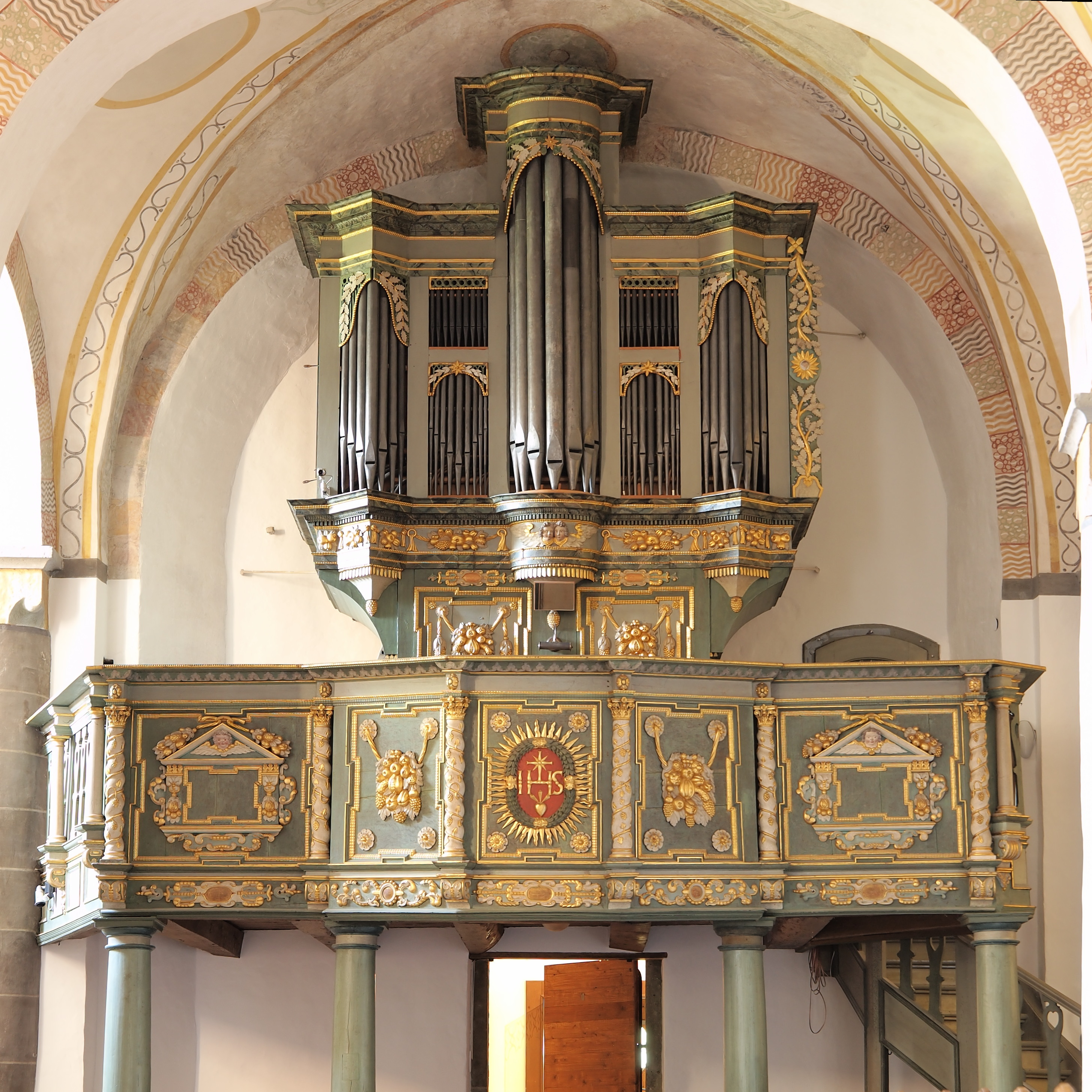 Balve, Orgel von 1786 in der Turmkapelle der Kirche Sankt Blasius